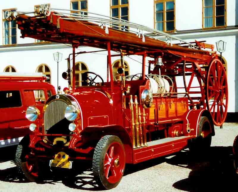 Scania-Vabis DLa Special Fire Engine 1915